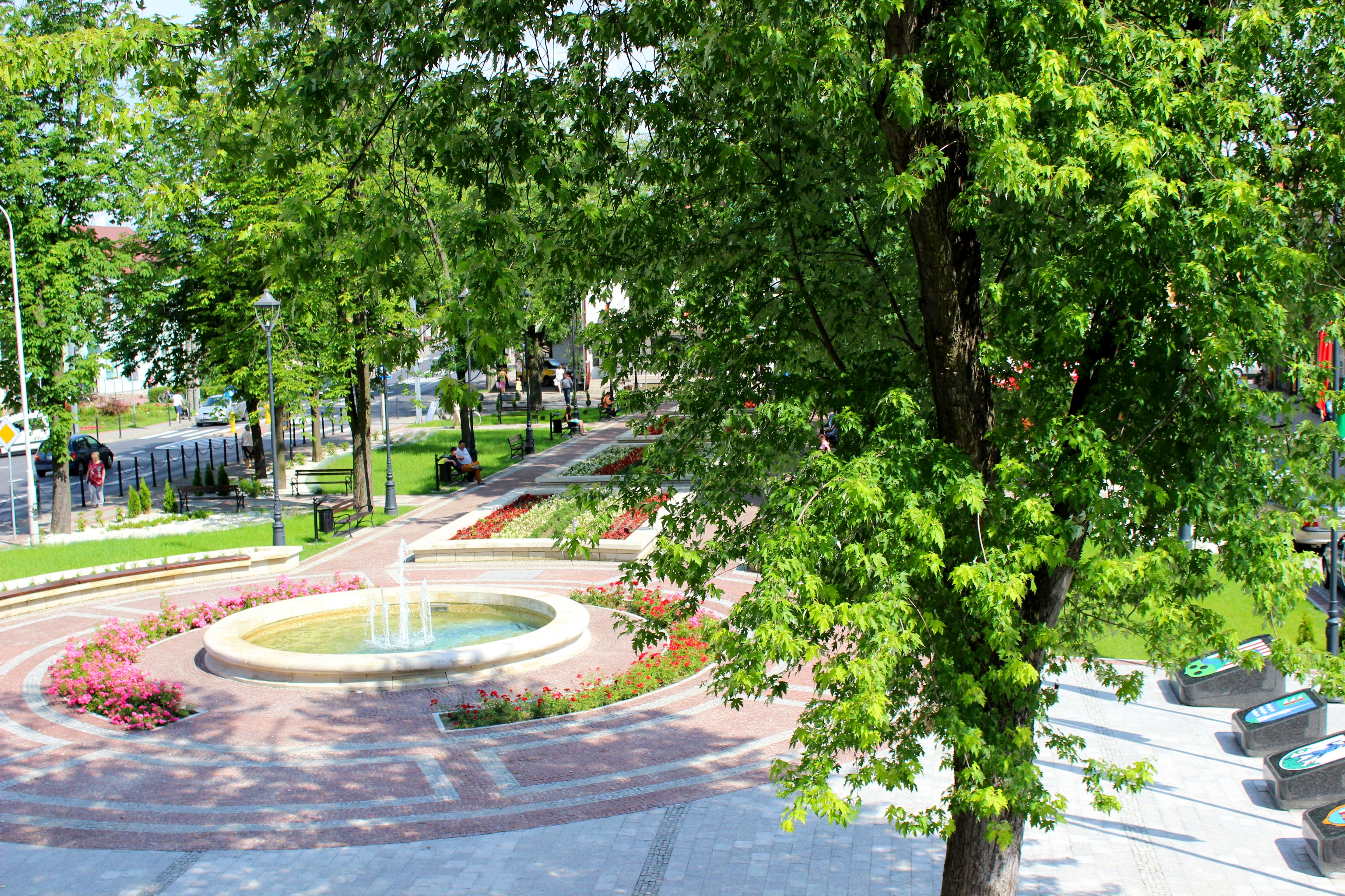 Widok na fontannę na Plantach Miast Partnerskich w Nisku